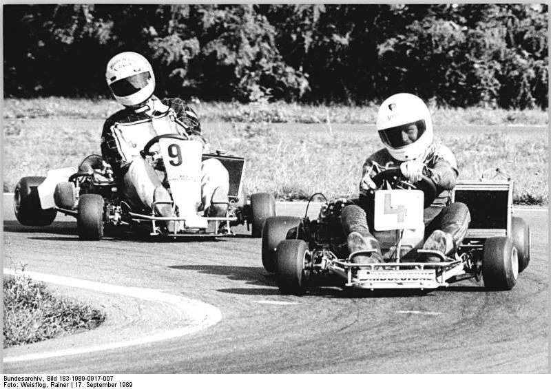 Cottbus, Kartmeisterschaften, Kartrenne ADN-ZB Weisflog 17.9.89 Cottbus: K-Wagen-Meisterschaft - Obwohl Wolfram Centner (Nr. 4) vom MC "Glückauf" Knappenrode den dritten und letzten Lauf zur DDR-Meisterschaft nur als Tageszweiter beendete, reichte es zum Meistertitel. Die Karts der Klasse "Formel C" - dahinter verbirgt sich die neueste internationale Kategorie mit wassergekühltem Motor - erreichten auf dem Cottbuser Pressefestring immerhin Tempo 90.